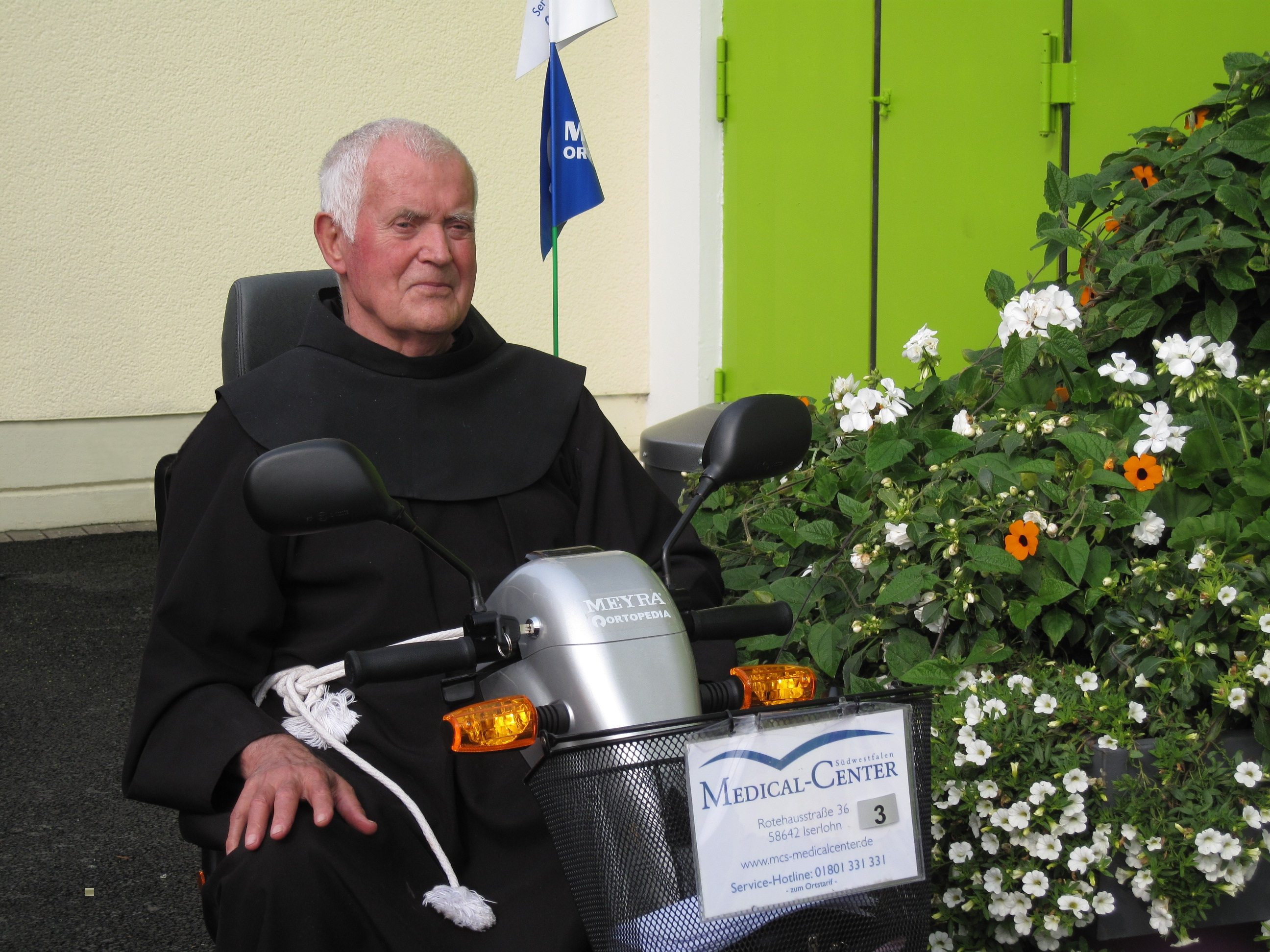 Pater Beda (Linus Vickermann, geboren am 24. Dezember 1934 in Opherdicke) auf der Landesgartenschau in Hemer anlässlich der Veranstaltung Pater Beda und die brasilianischen Gäste.